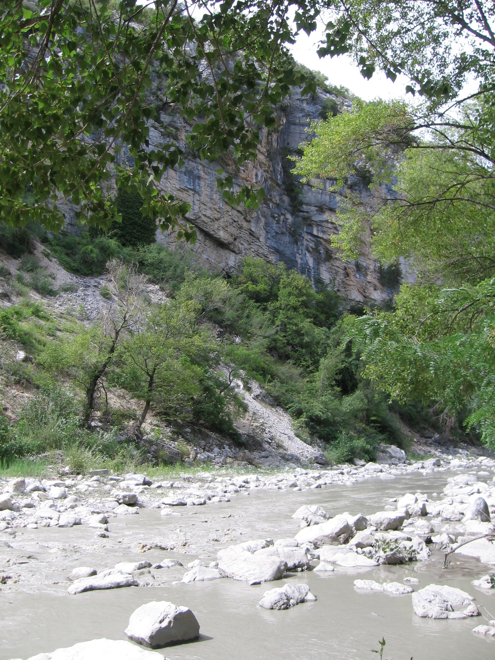 river l'Eygues near Nyons